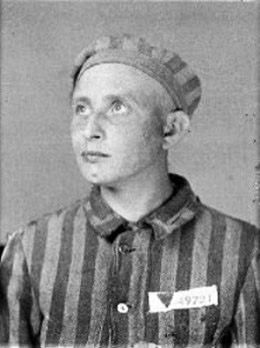 Vasyl Bandera in Auschwitz